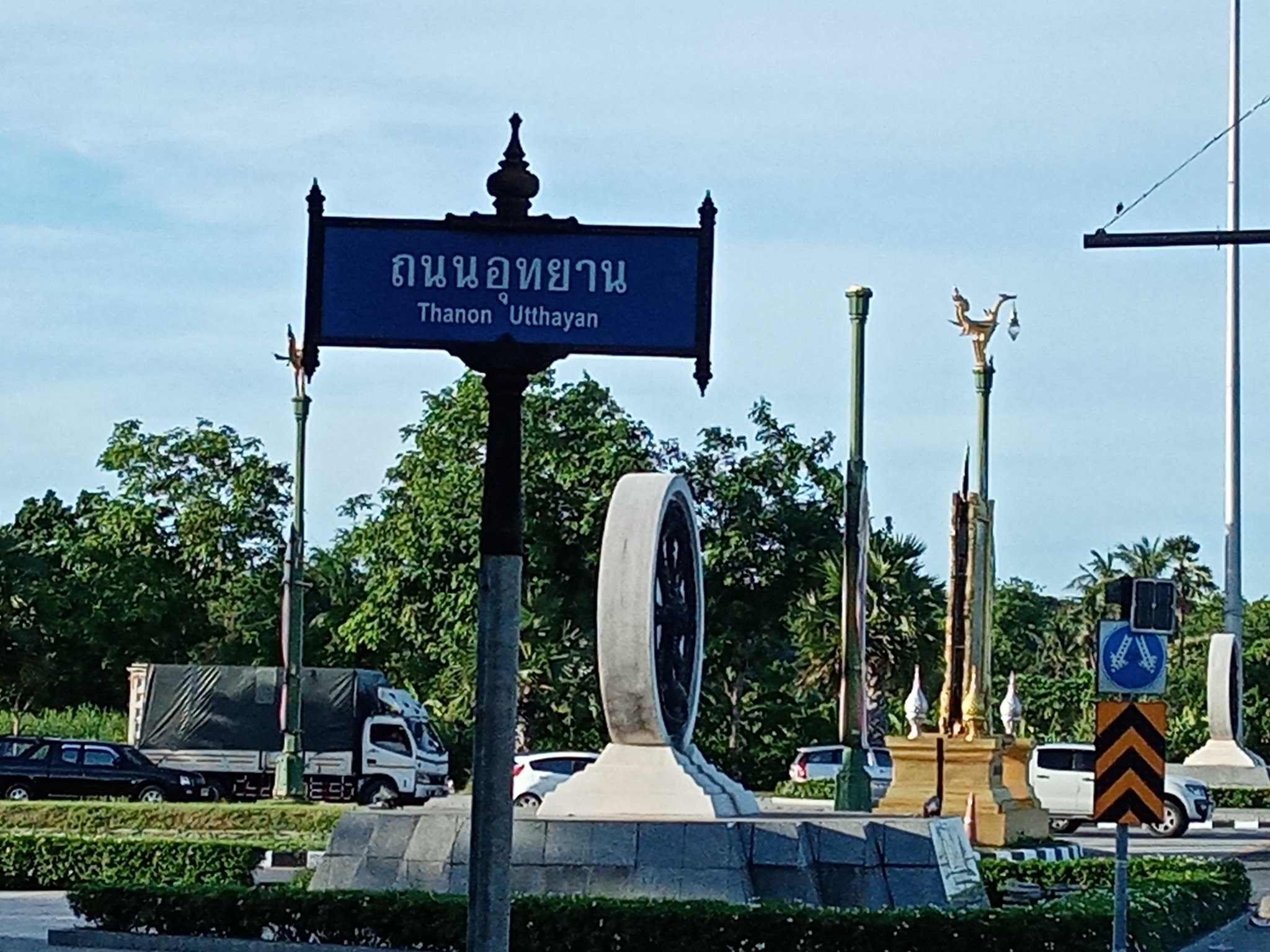 ป้ายชื่อถนนอุทยาน ช่วงตัดกับถนนพุทธมณฑลสาย 4